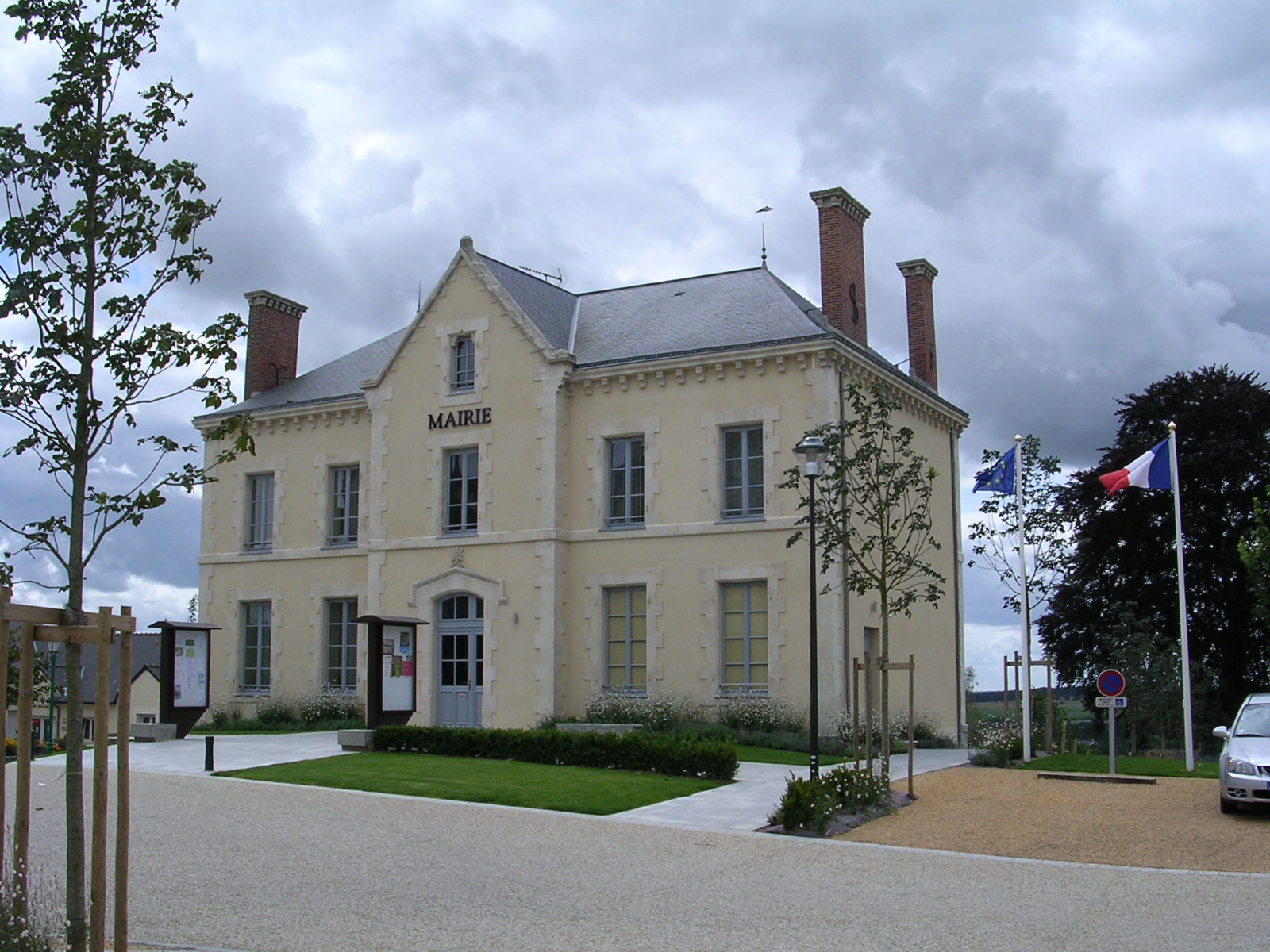 La mairie d'Argentré depuis 2007 (ancien presbytère)